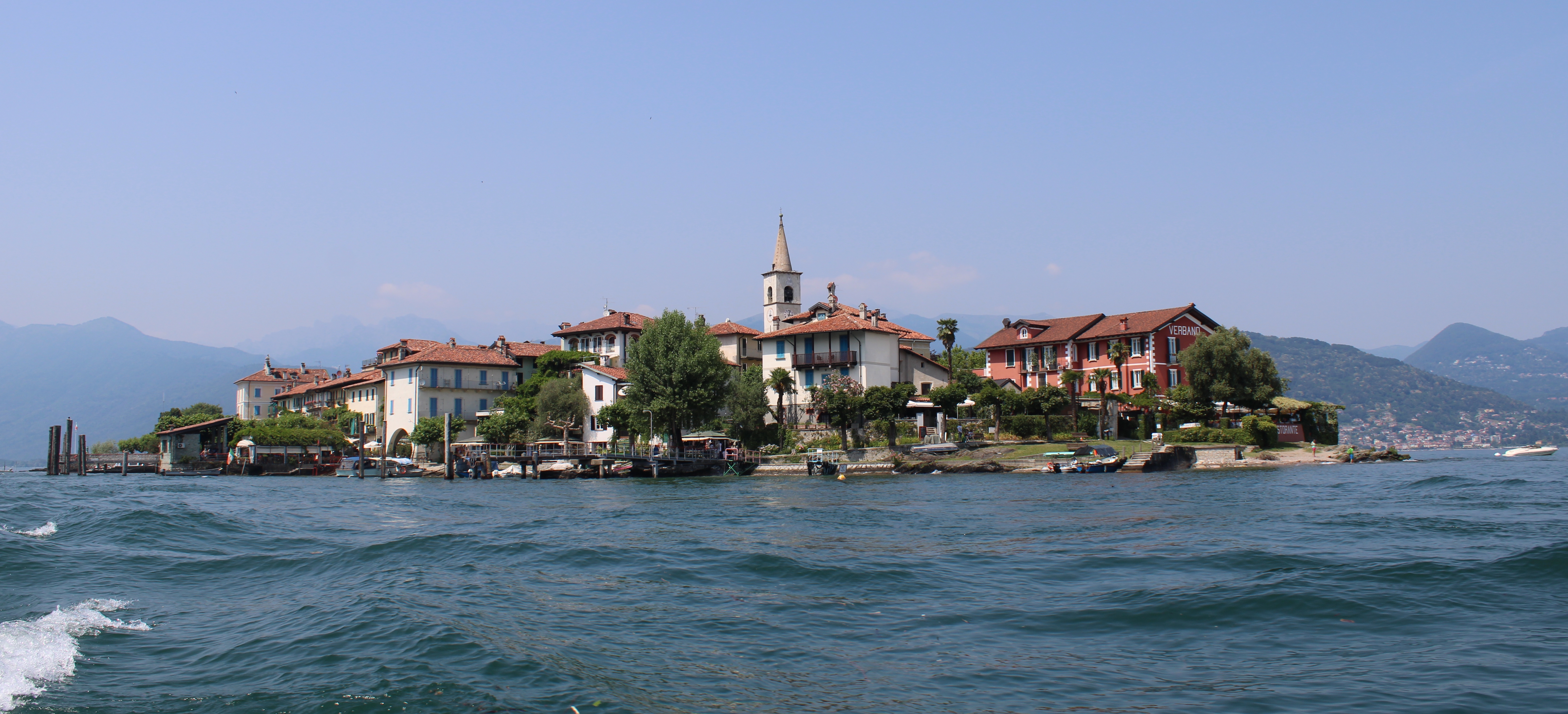 Vue de l'île depuis un bateau.